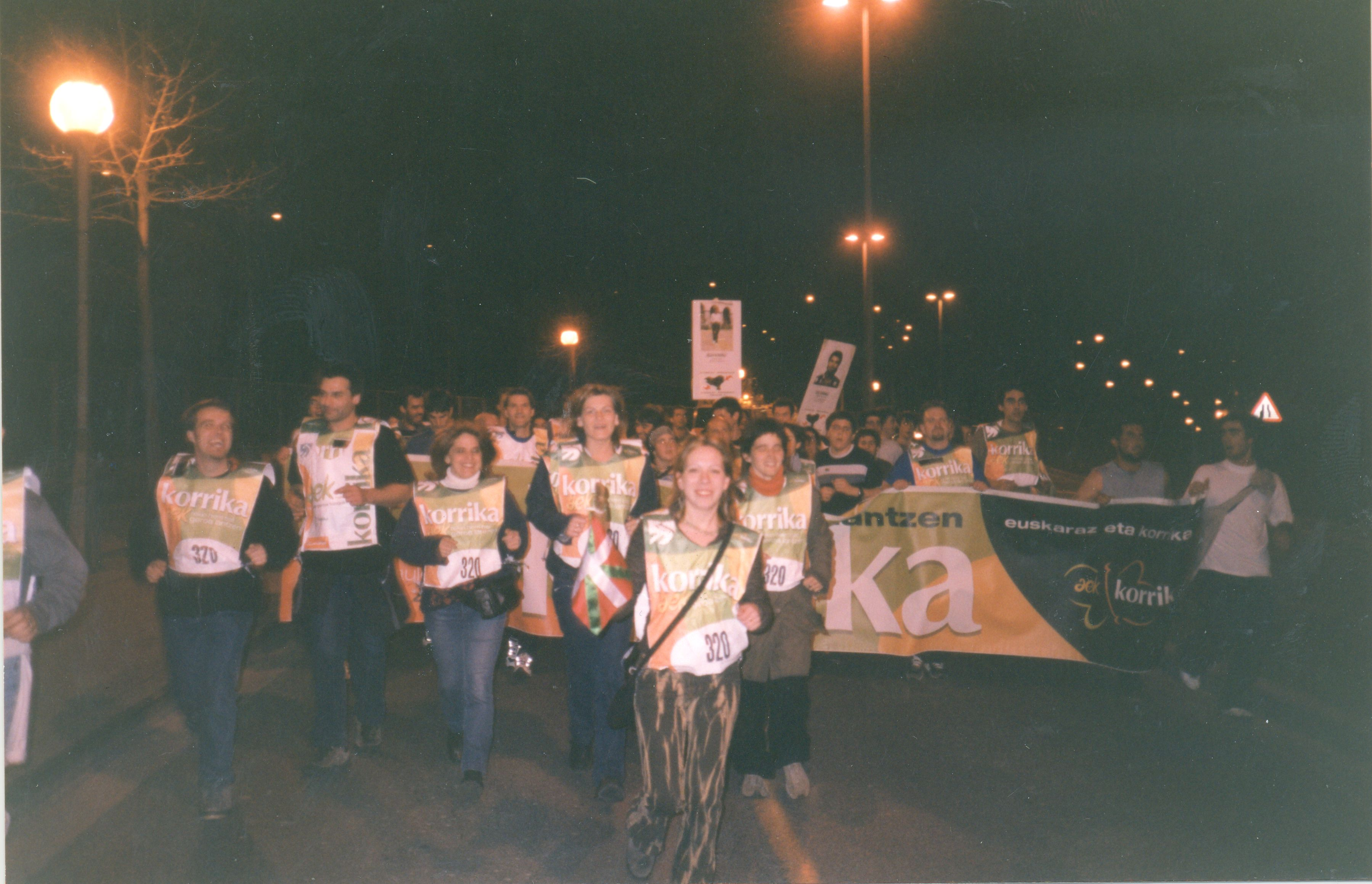 Colección AMARAuna Bilduma 2003 Er. 341 Iturria / Fuente: Mertxe Mardaras Informazio gehiago / Más información: Amarako Ernest Lluch Kultur Etxeko Liburutegia / Biblioteca del Centro Cultural Ernest Lluch de Amara (Donostia-San Sebastián). Korrika, popular relay race in support of the Basque language across Donostia-San Sebastián